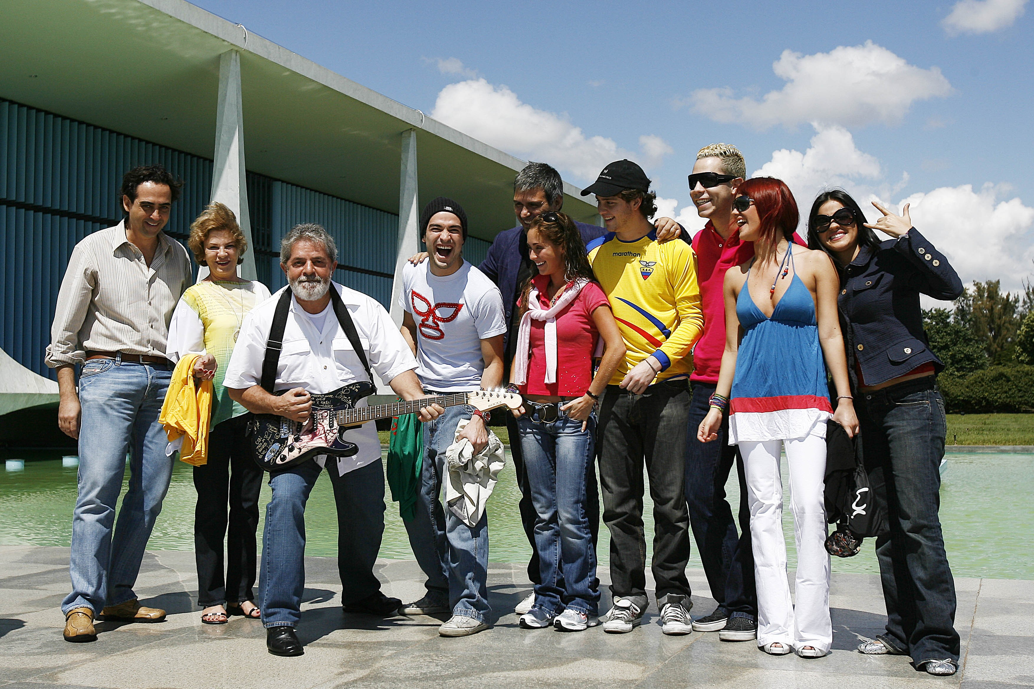 Presidente Luiz Inácio Lula da Silva posa com guitarra doada pelo grupo mexicano RBD ao programa Fome Zero.